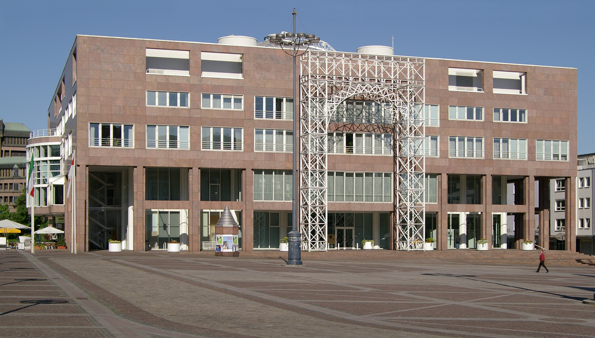 Rathaus Dortmund 2007